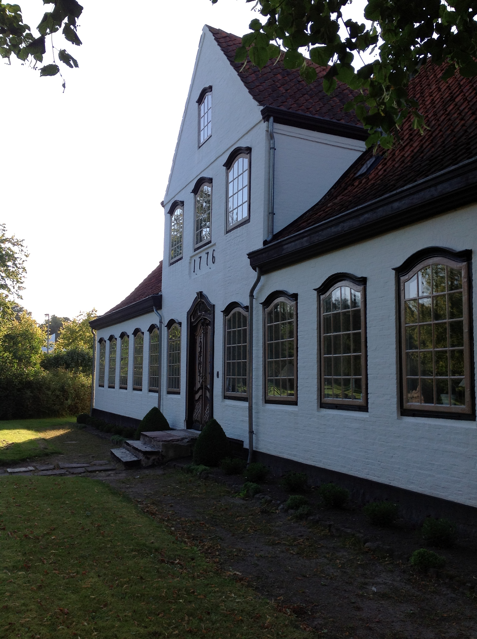 Slotspræstegården i Augustenborg